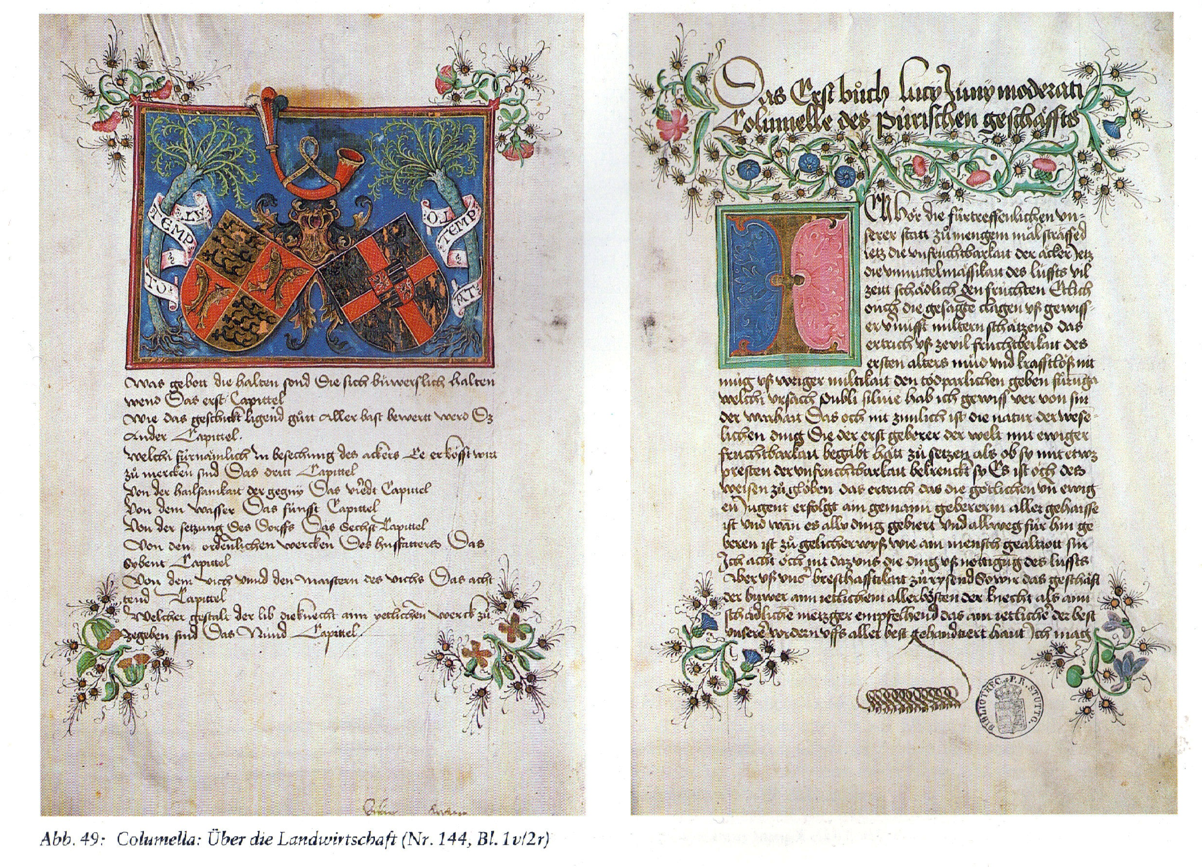 Württembergisches Landesbibliothek Stuttgart Cod.cam.et oec. 2° 1, Bl. 1v, 2r